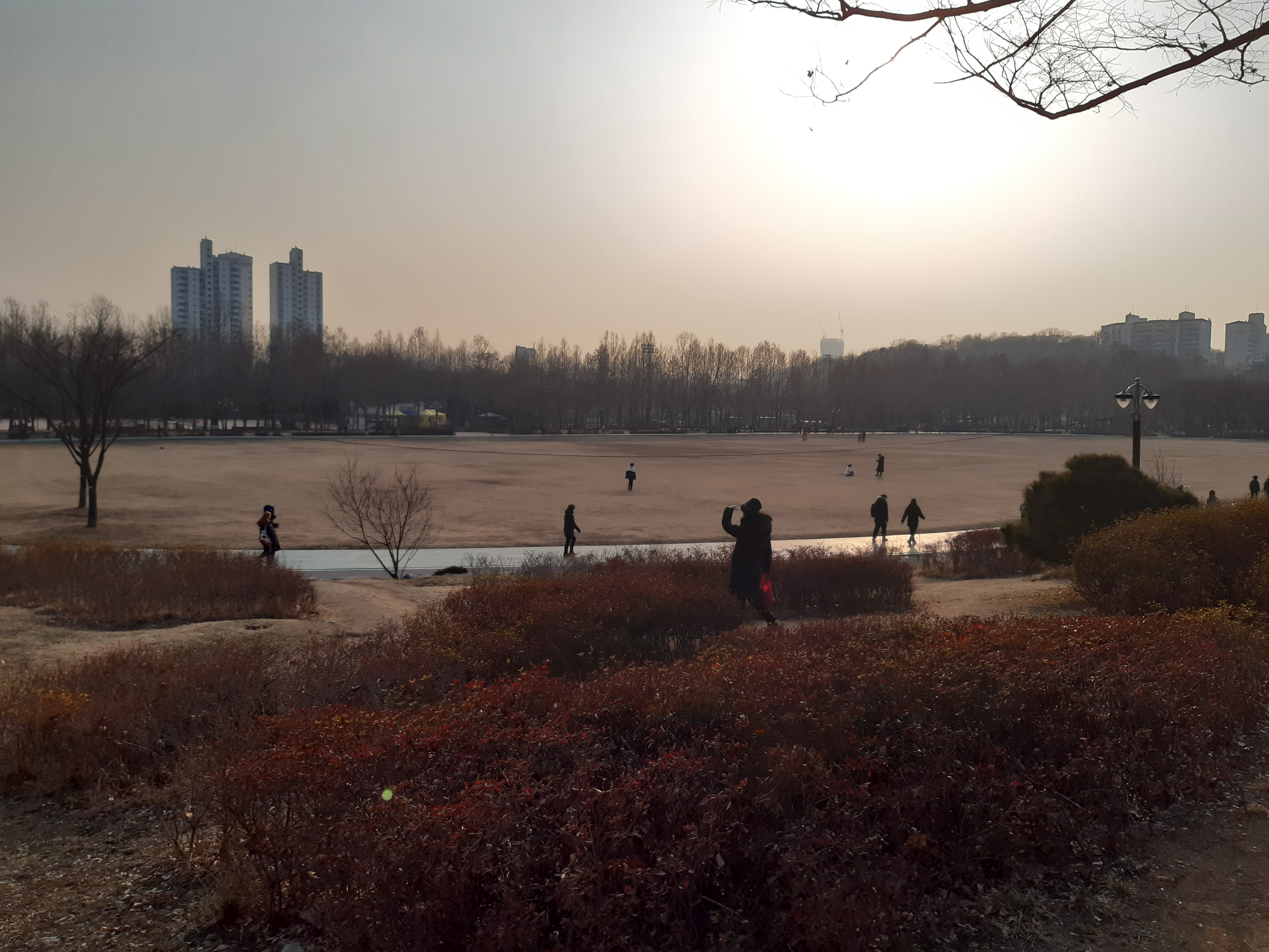 2020년 2월 20일 보라매공원 잔디광장